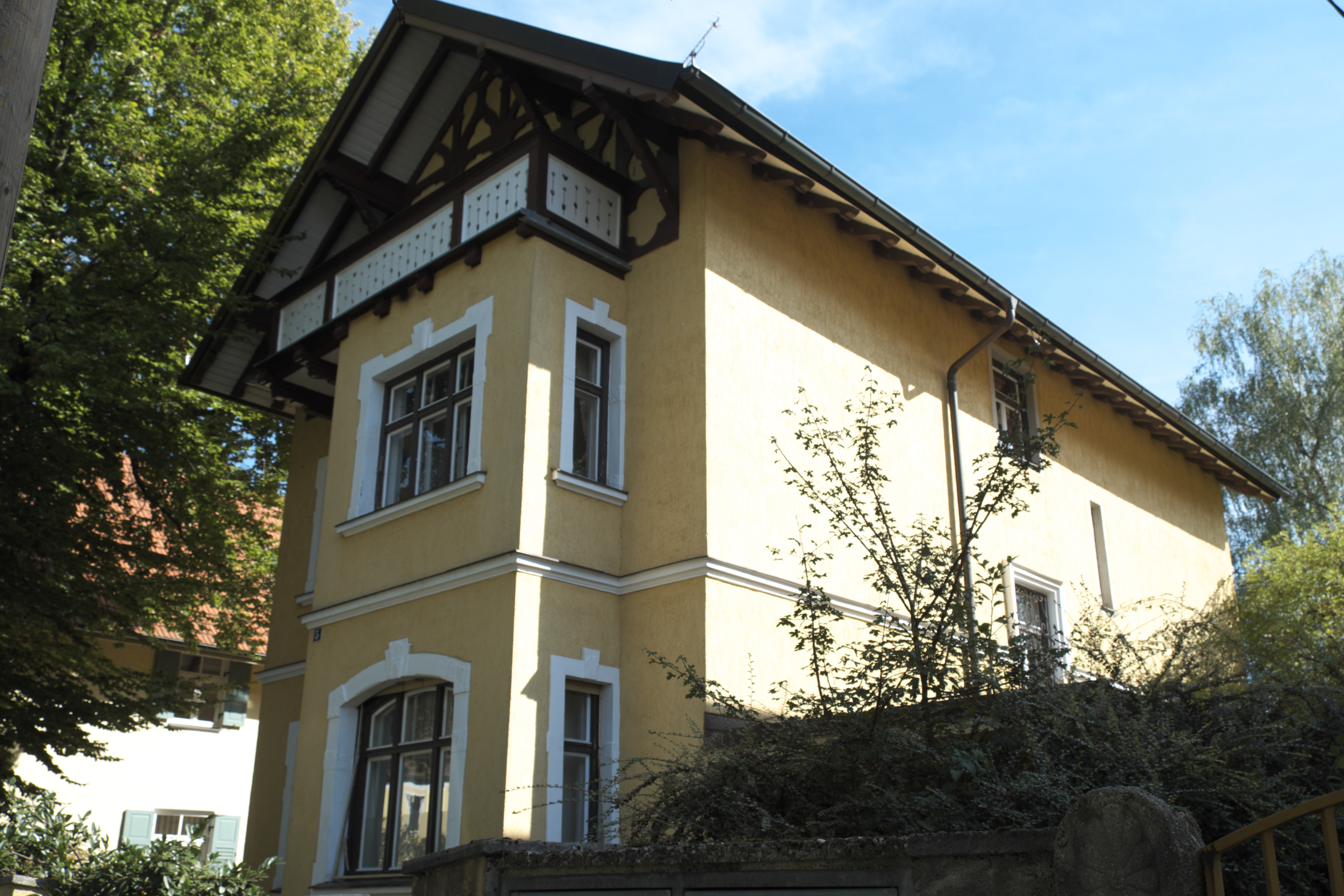 Villa, Apfelallee 5, in Obermenzing im Stadtbezirk Pasing-Obermenzing in München (Bayern/Deutschland), um 1900 erbaut